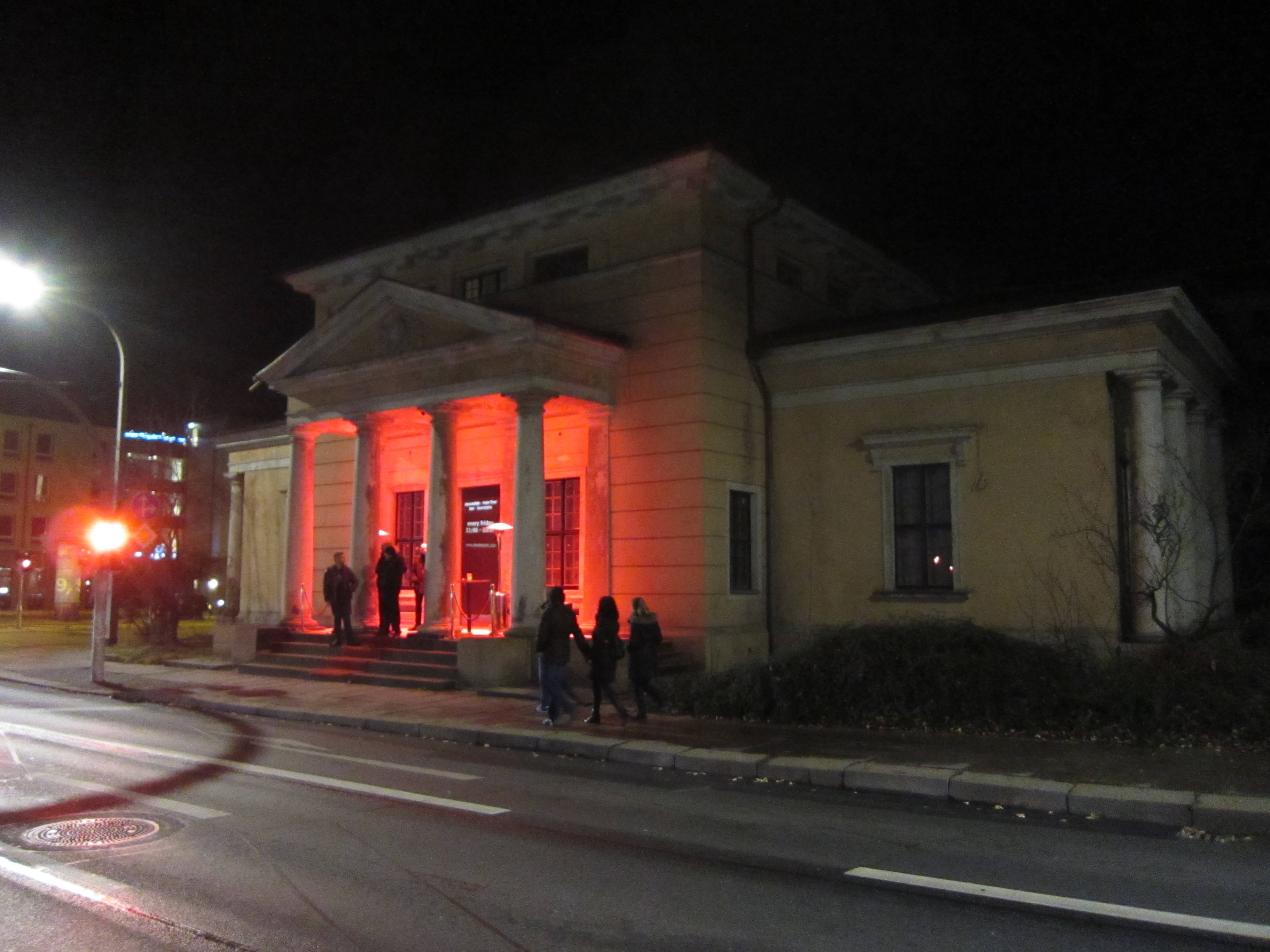 Nordöstliches der beiden 1827/1829 von Gottlob Friedrich Thormeyer errichteten Torhäuser Leipziger Tor - Eröffnung der Diskothek